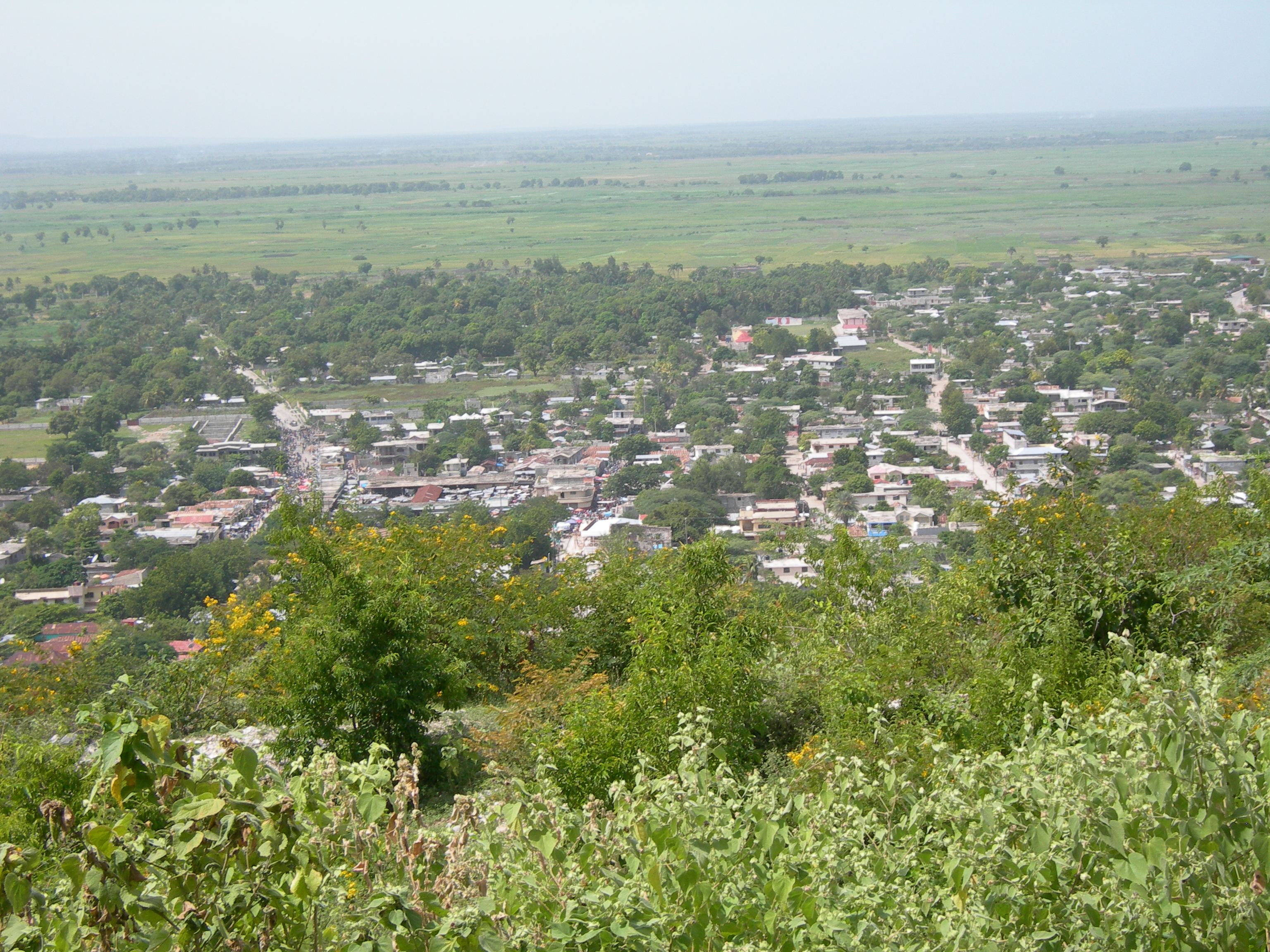 Vue de la commune de Dessalines, dans la plaine de l'Artibonite, en Haïti.